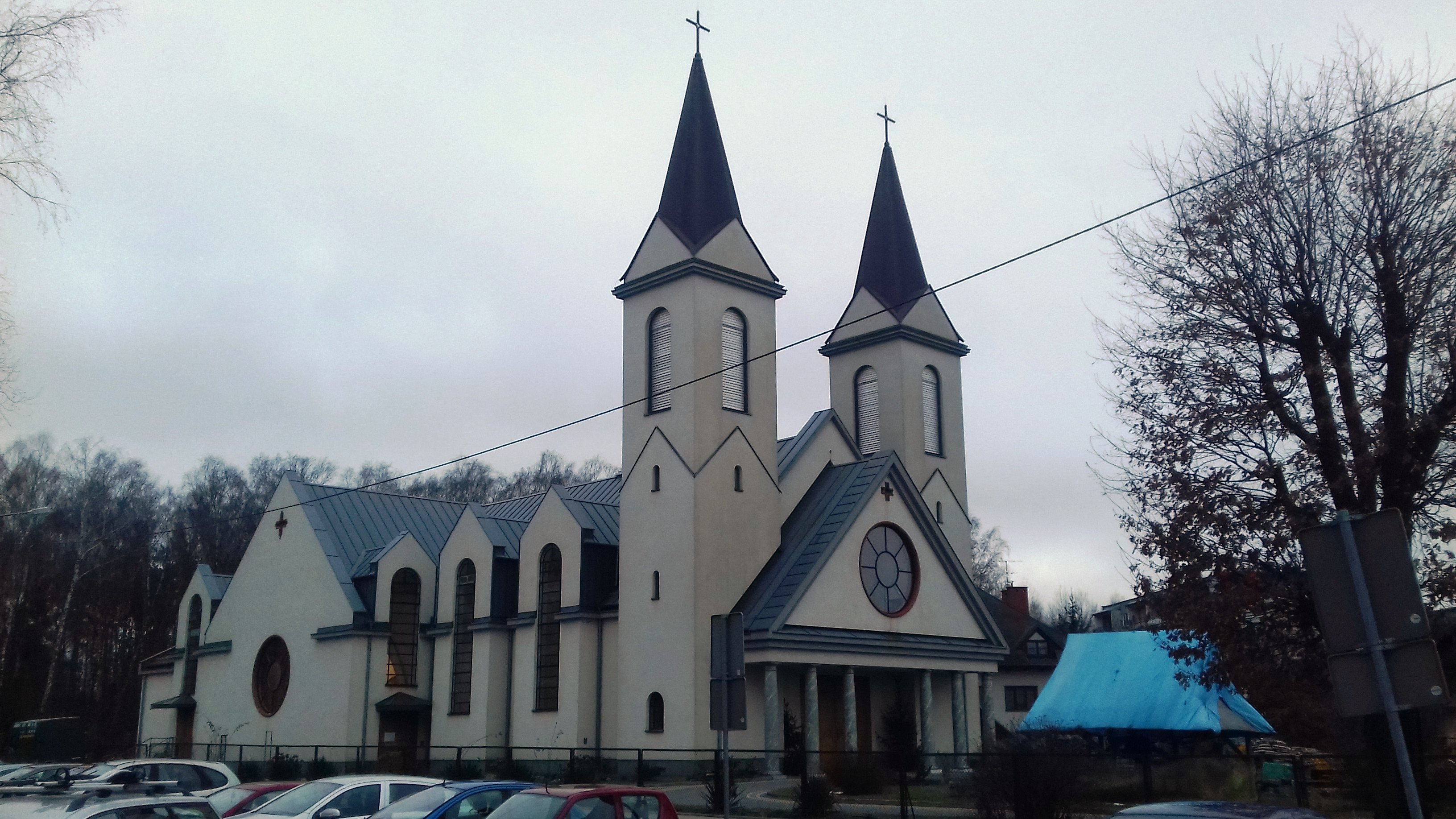 Mińsk Mazowiecki - kościół Św. Jana Chrzciciela